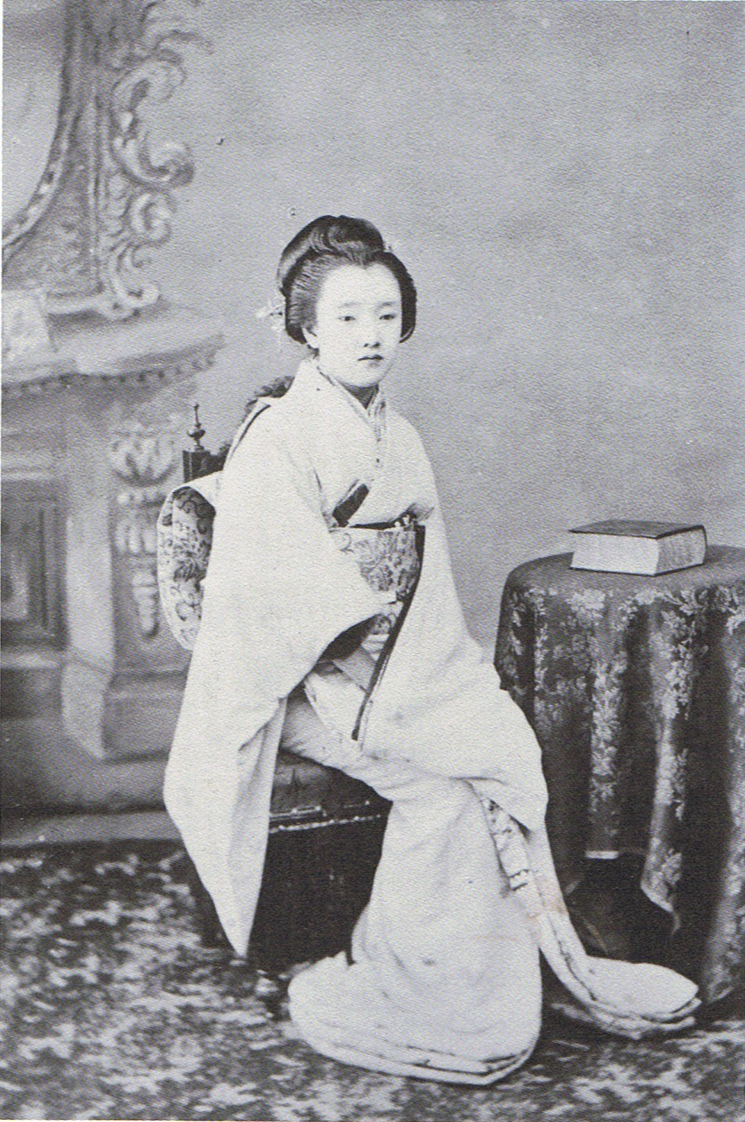 北小路家時代の燁子（柳原白蓮）16歳。